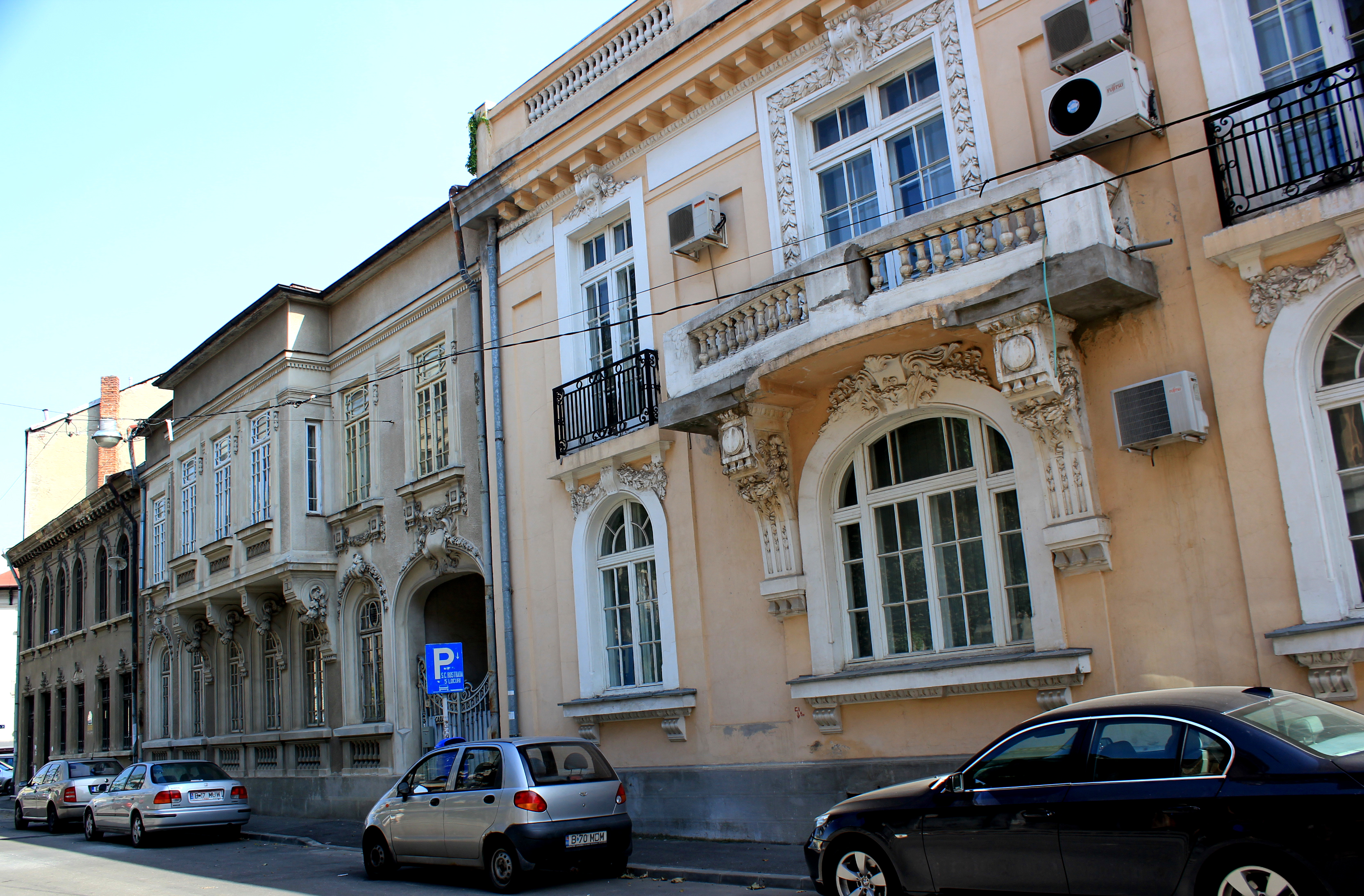 Casă Sperantei 42-46